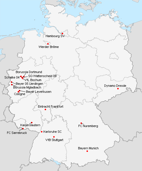 Répartition des clubs en 1.Bundesliga 1992-1993.